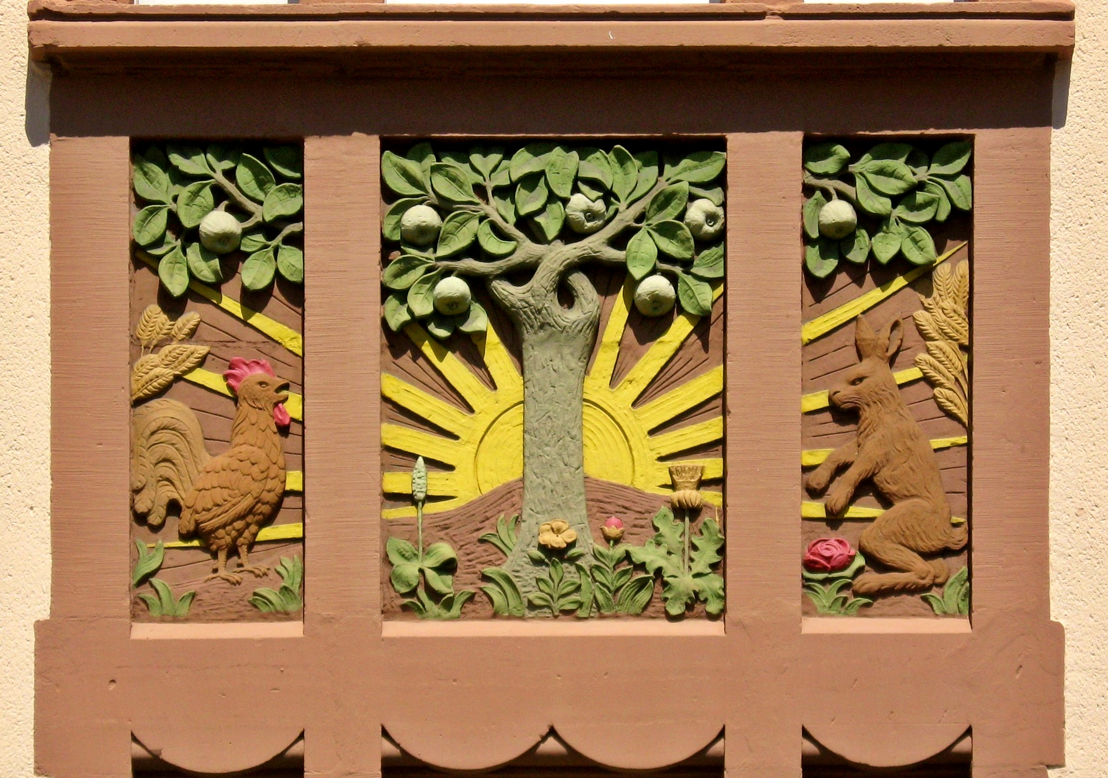 Haus Göbenstraße Dillingen